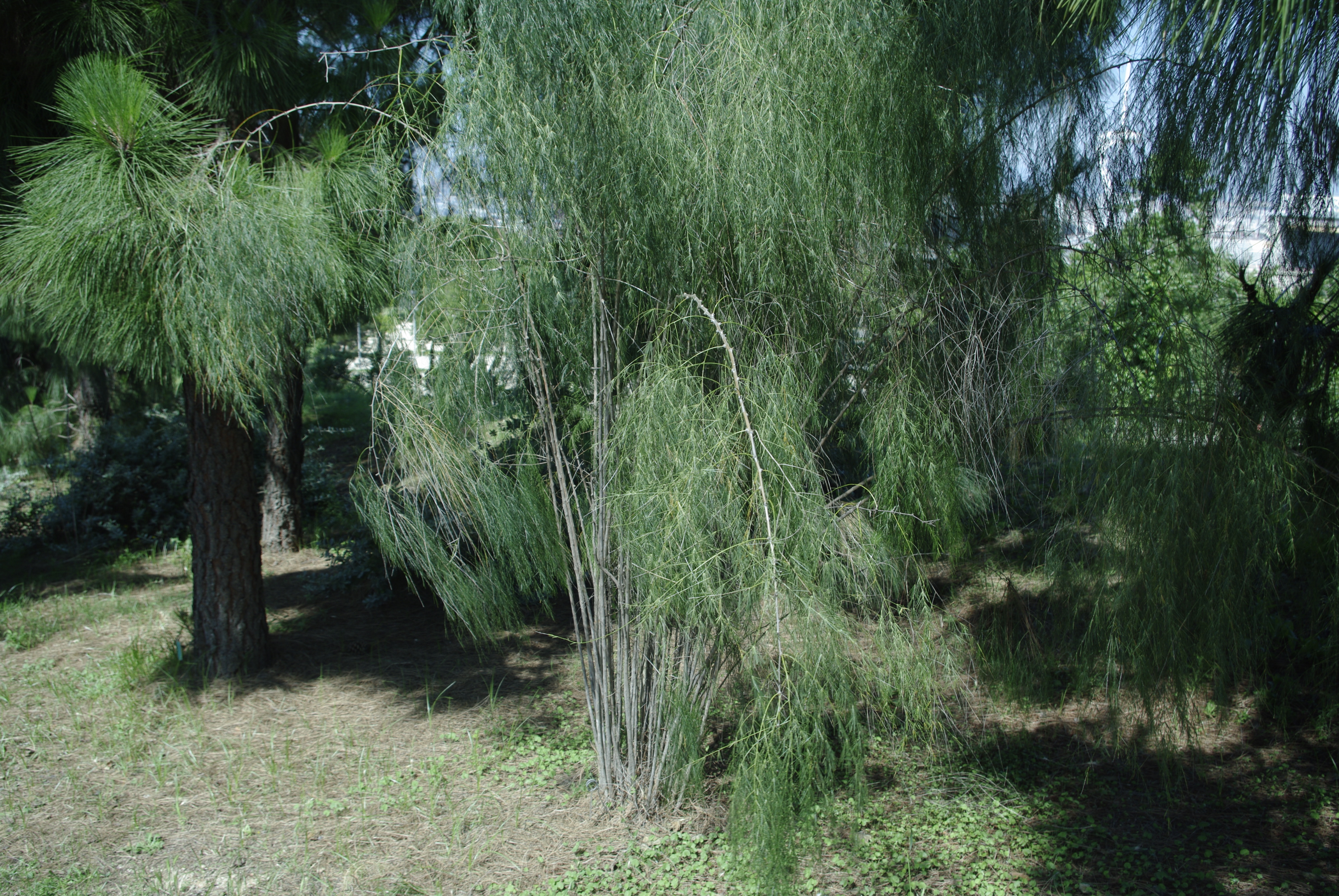 Asparagus plocamoides al Jardí Botànic de Barcelona.